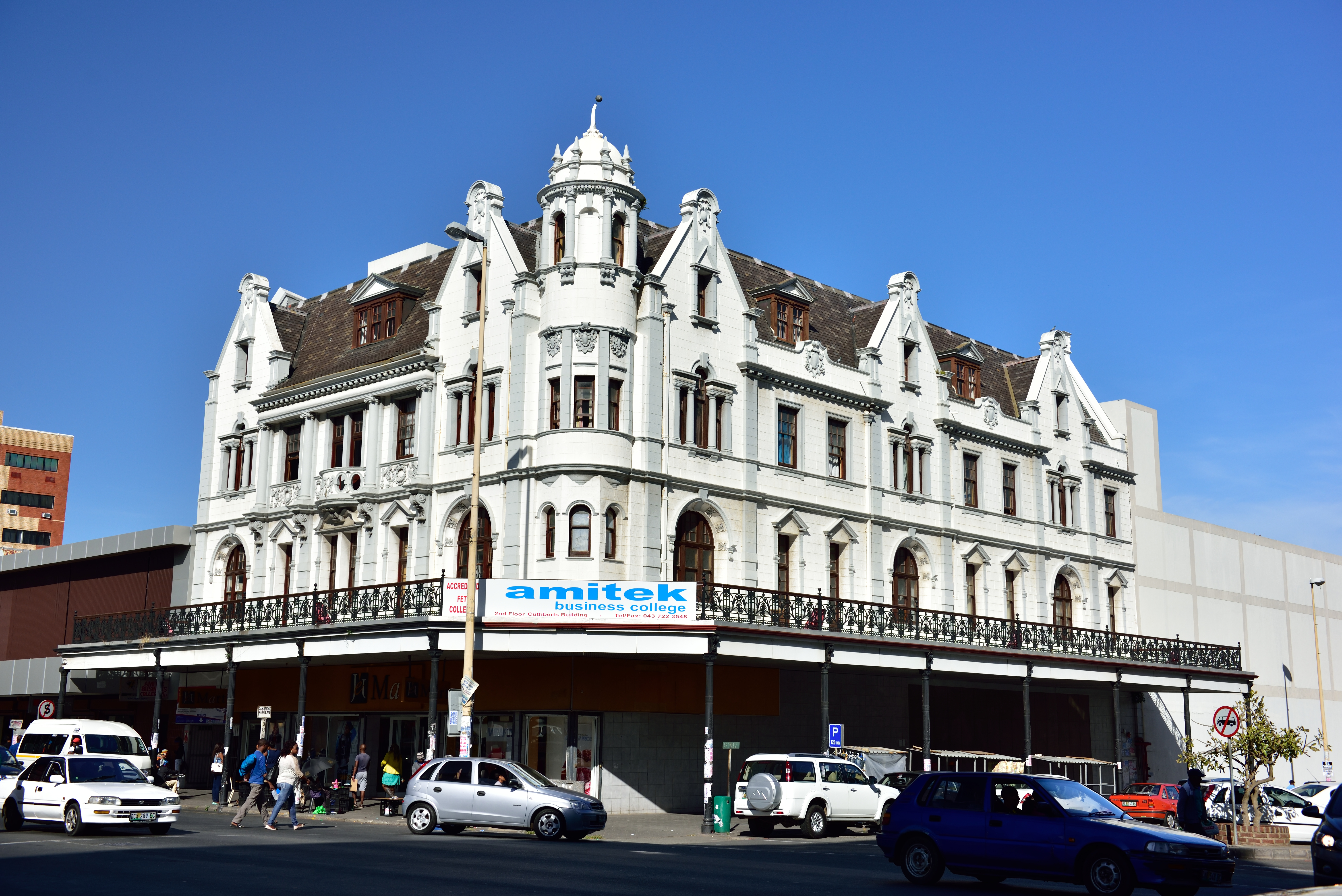 Vue de l'Eastern Cape en Afrique du Sud.